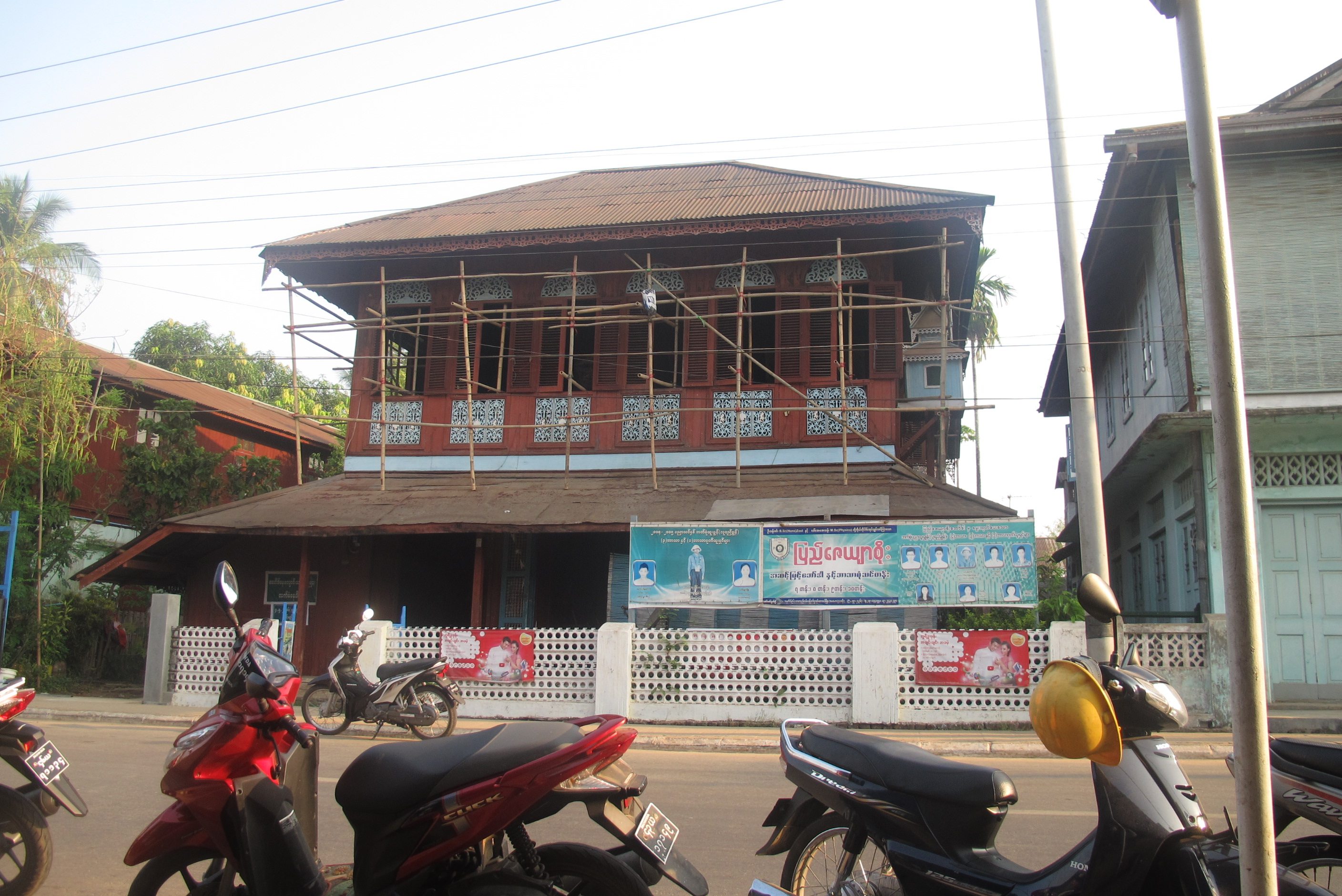 Dawei, Myanmar (Burma)